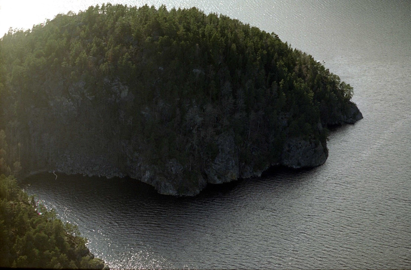 Brattøykollen sett fra luften